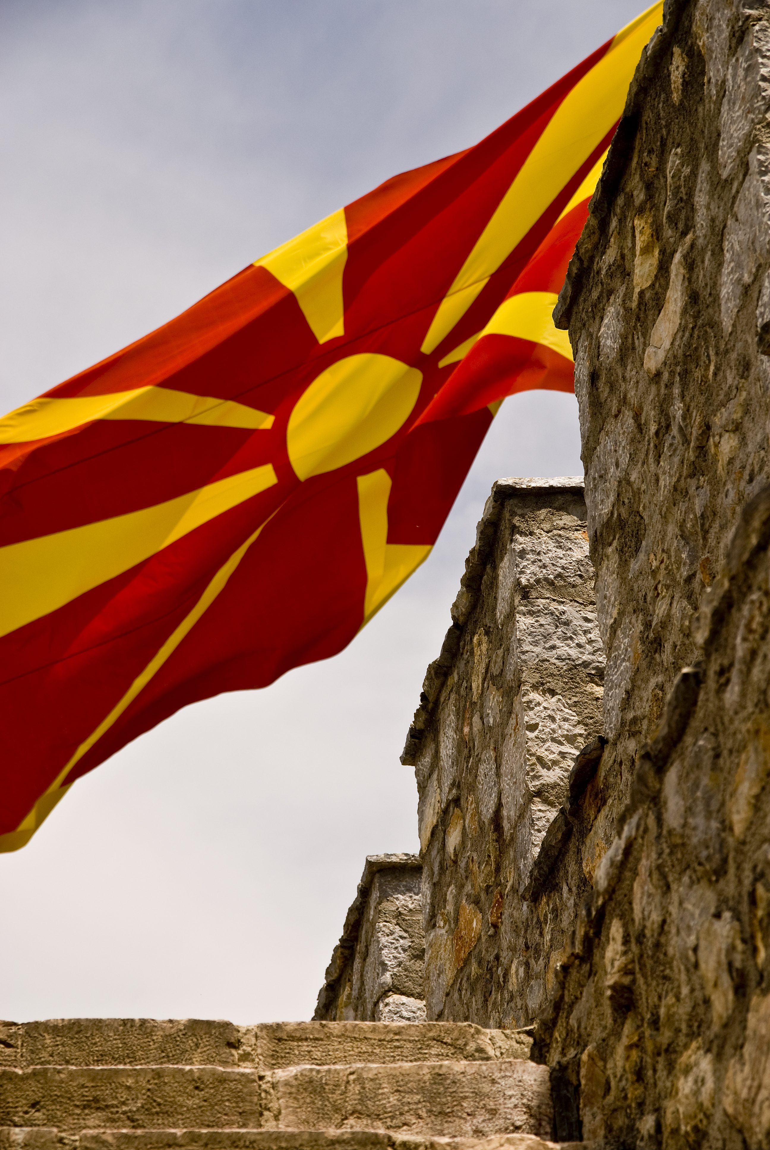 Samuel's Fortress